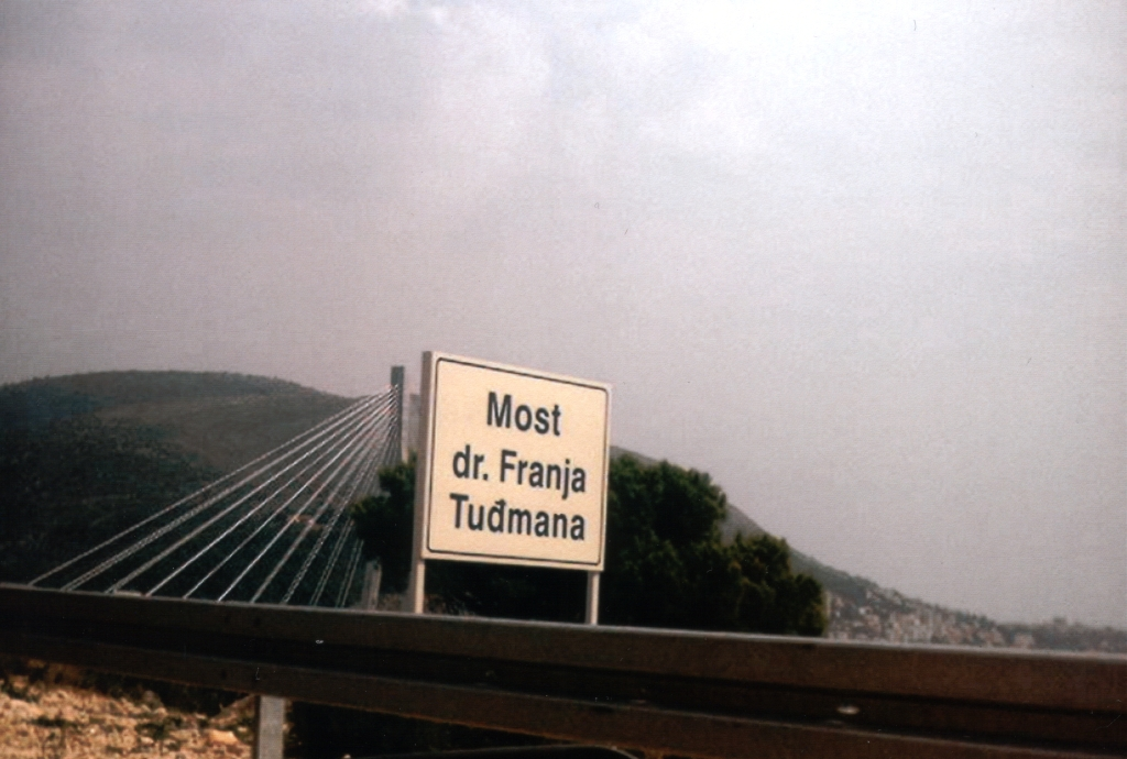 Natpis za most dr. Franja Tuđmana u Dubrovniku